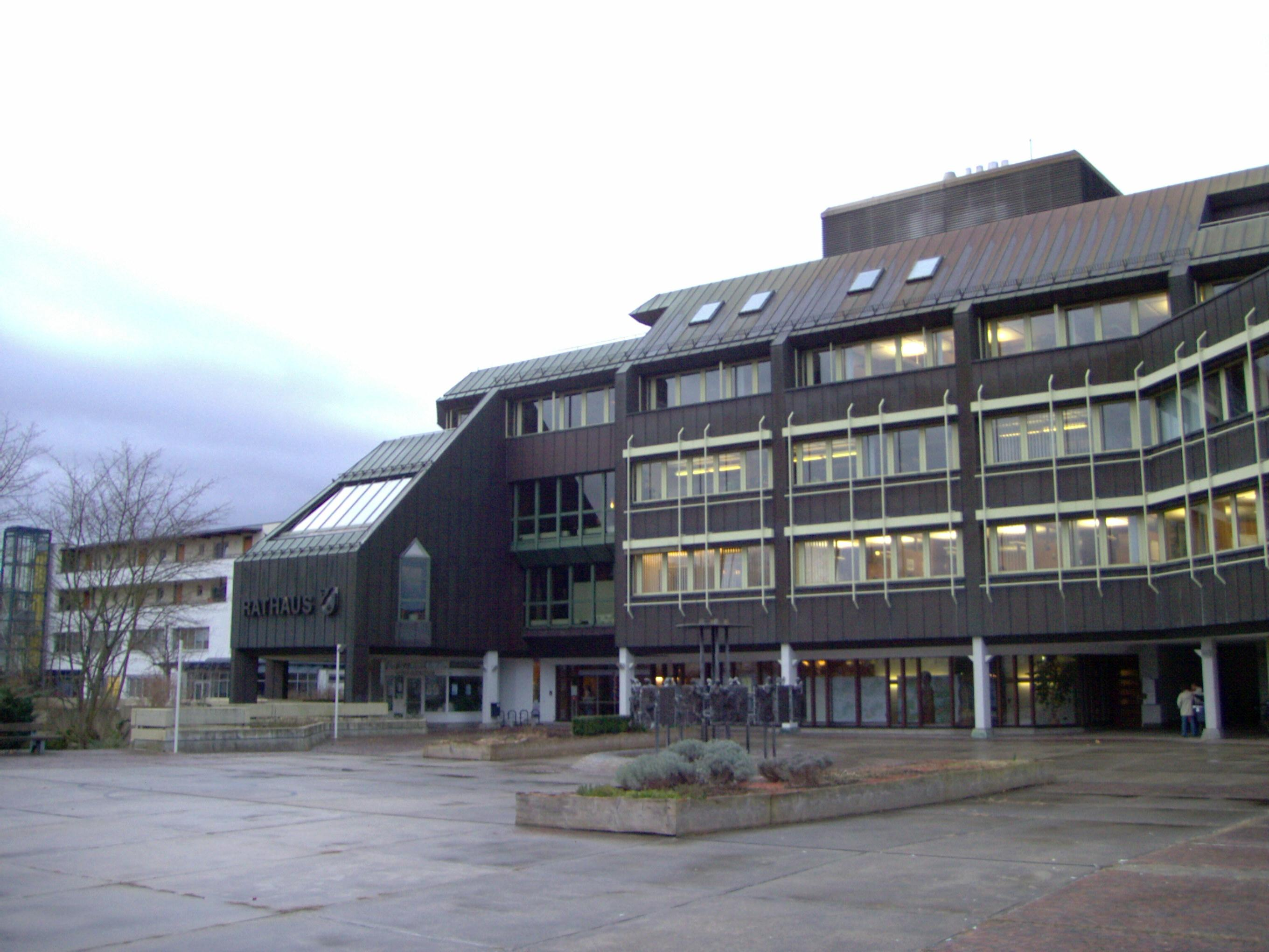 Mössingens Neues Rathaus von Nordosten aus gesehen.